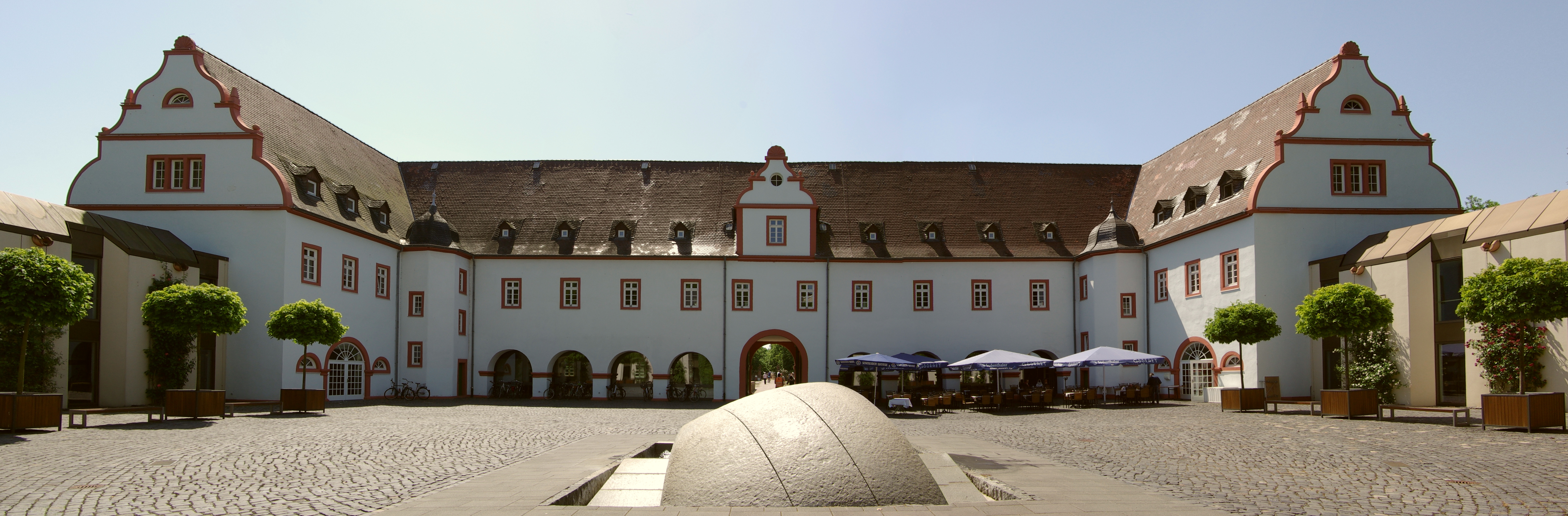 Heusenstamm, Schloss Schönborn, Rückseite